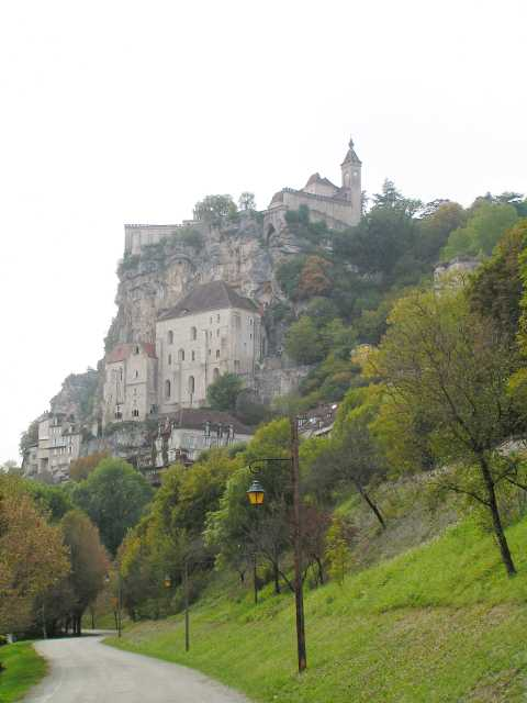 Vue de Rocamadour (46) Catégorie:Image de Rocamadour